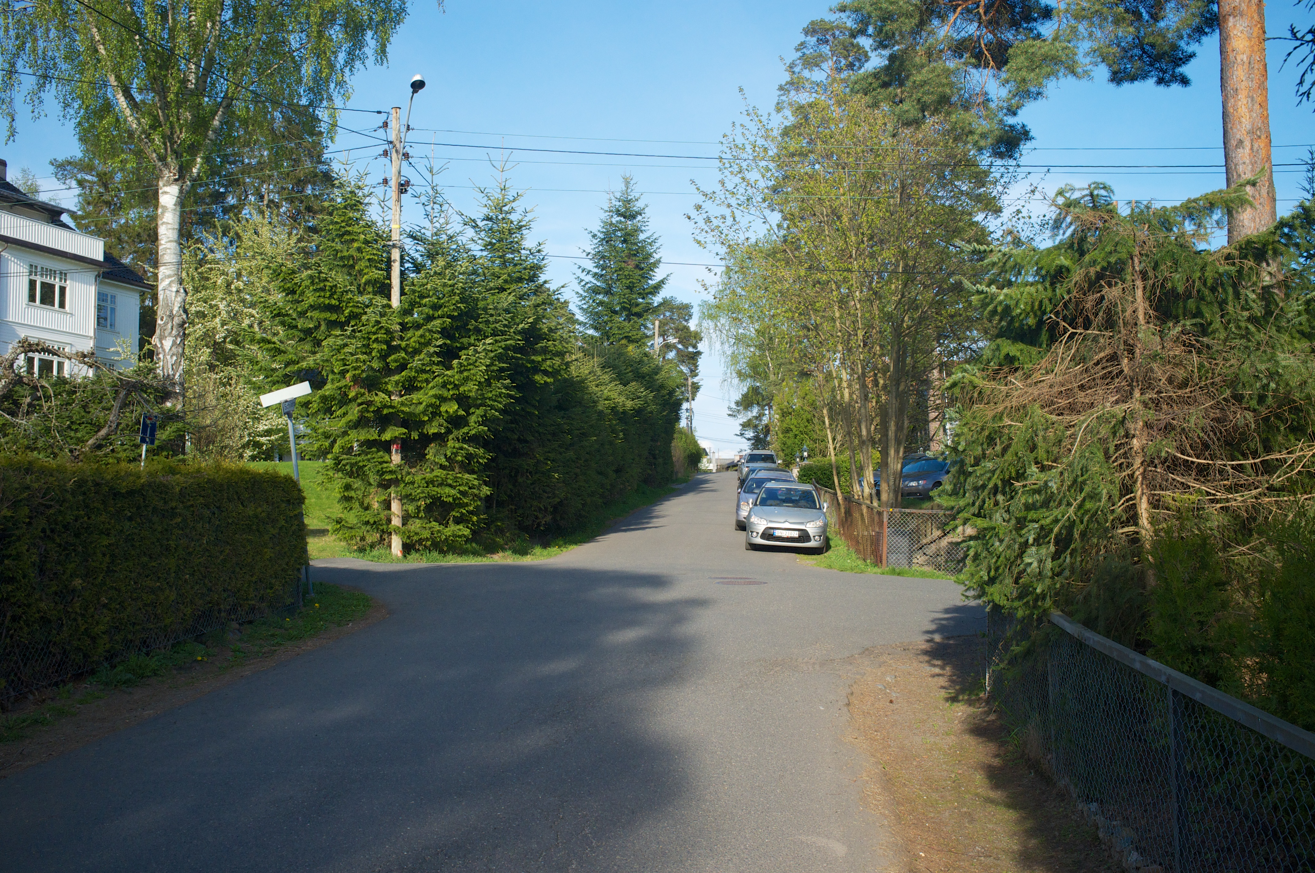 Erling Schiøtz' vei i Oslo.